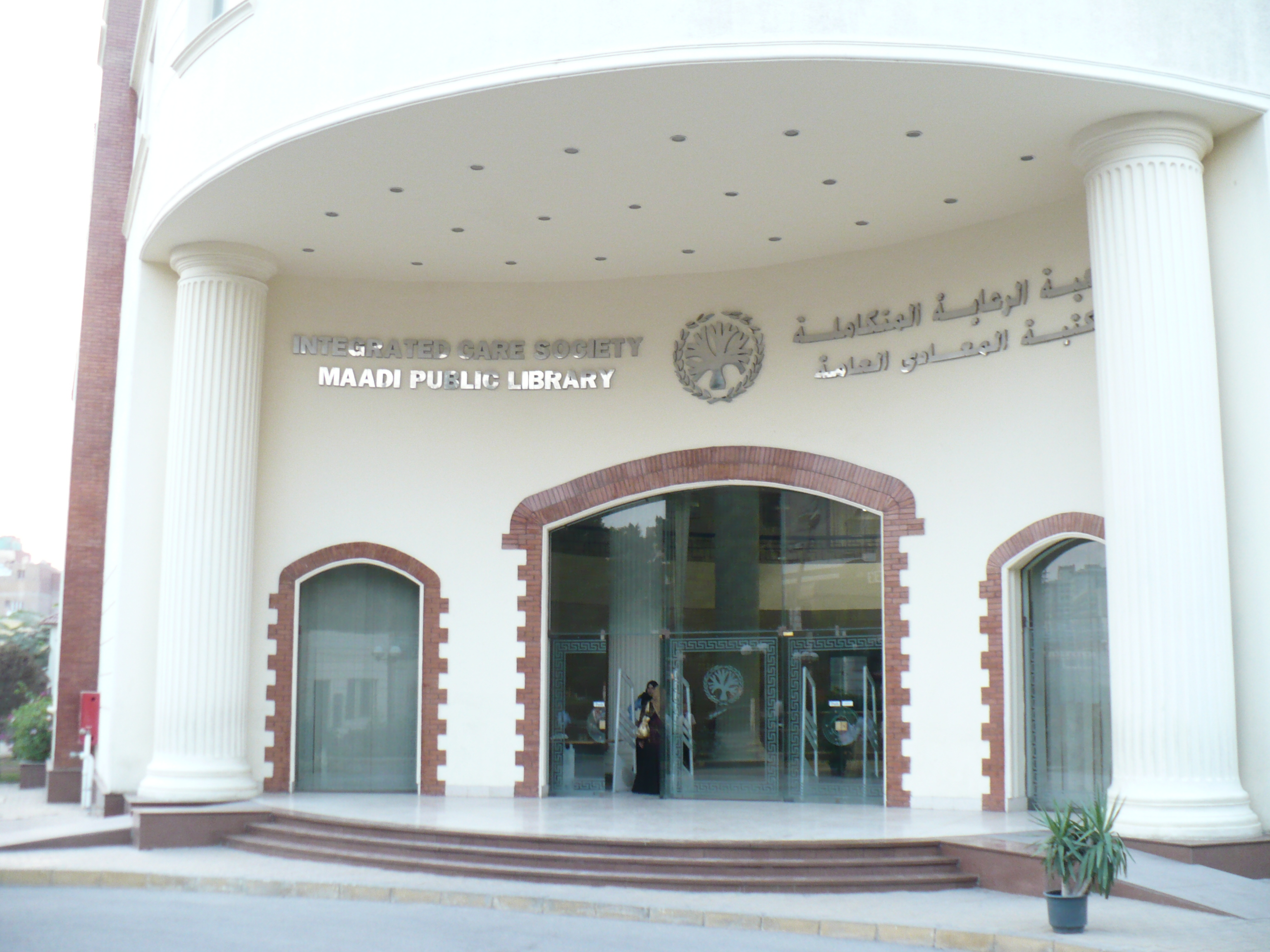 مكتبة المعادي